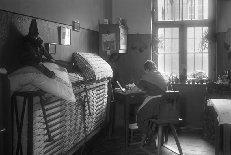 Ein Blick in das Frauengefängnis in der Barnimstr. in Berlin ! Eine Gefangenenzelle im Frauengefängnis in Berlin. Diese Kammer mutet wie ein gemütliches Mädchenzimmer an.